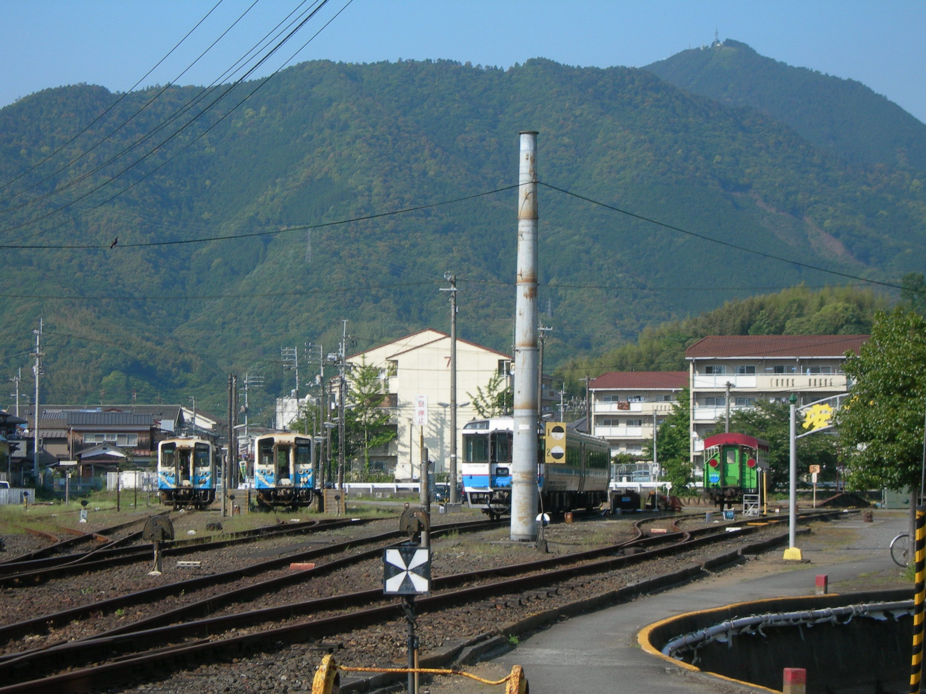 宇和島運転区 構内